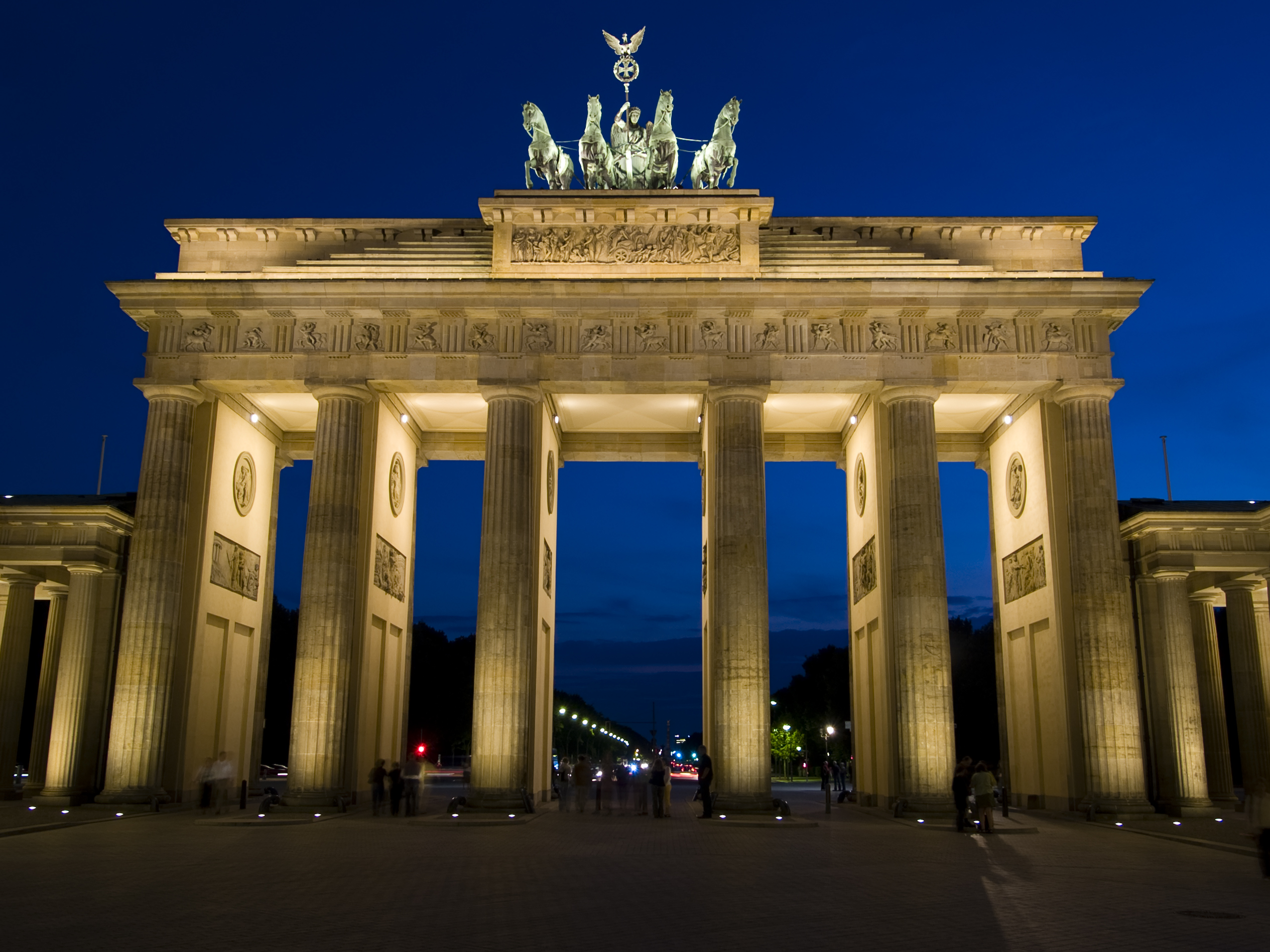 Quadriga, Brandenburger Tor abends/nachts